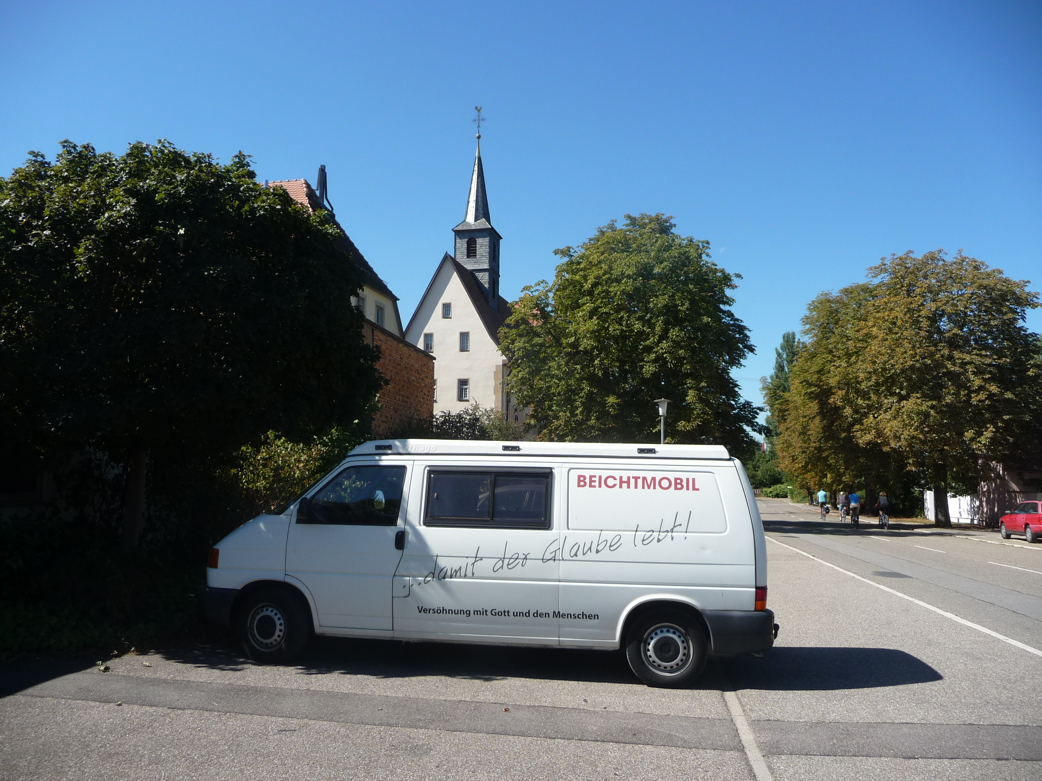 Die Geschichte der Marienwallfahrtskirche im nordbadischen Ort Waghäusel reicht bis in das frühe 15. Jahrhundert zurück.